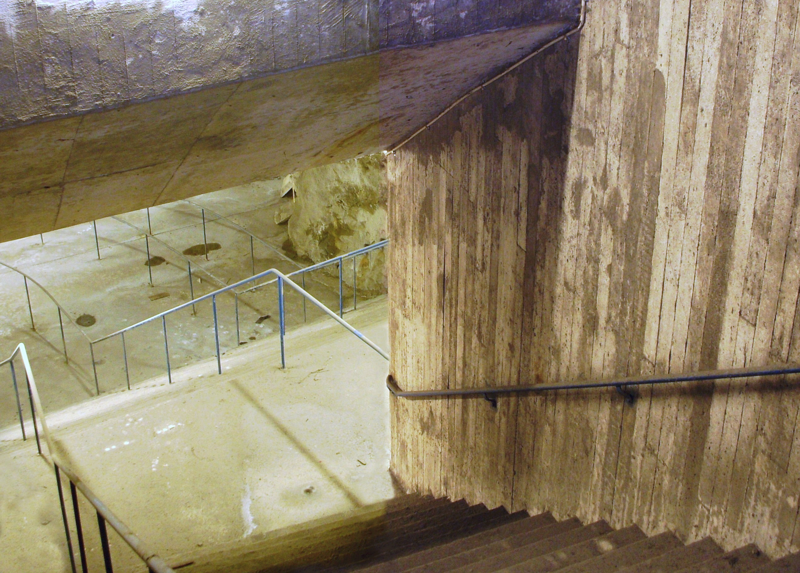 Inrymningstrapporna till Johannes skyddsrum från Kammakargatan